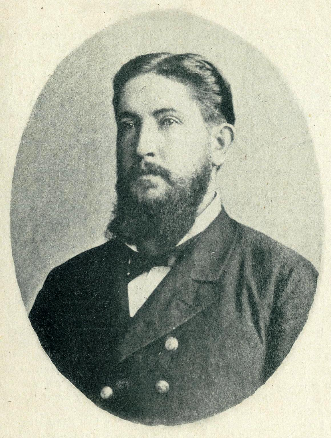 Fotografía del Capitán de Navío Juan Bautista Lazaga y Garay (1845 - 1898)